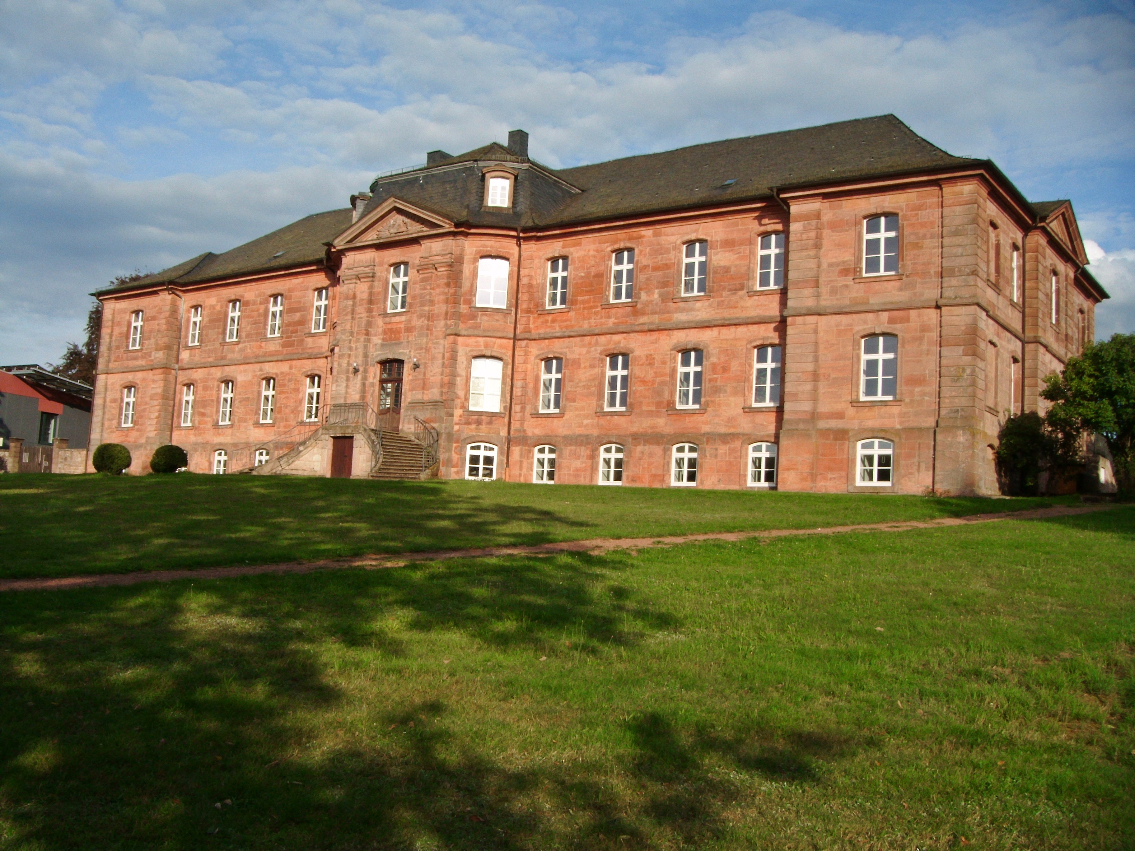 Schloss Trippstadt, Rückseite (Gartenseite)